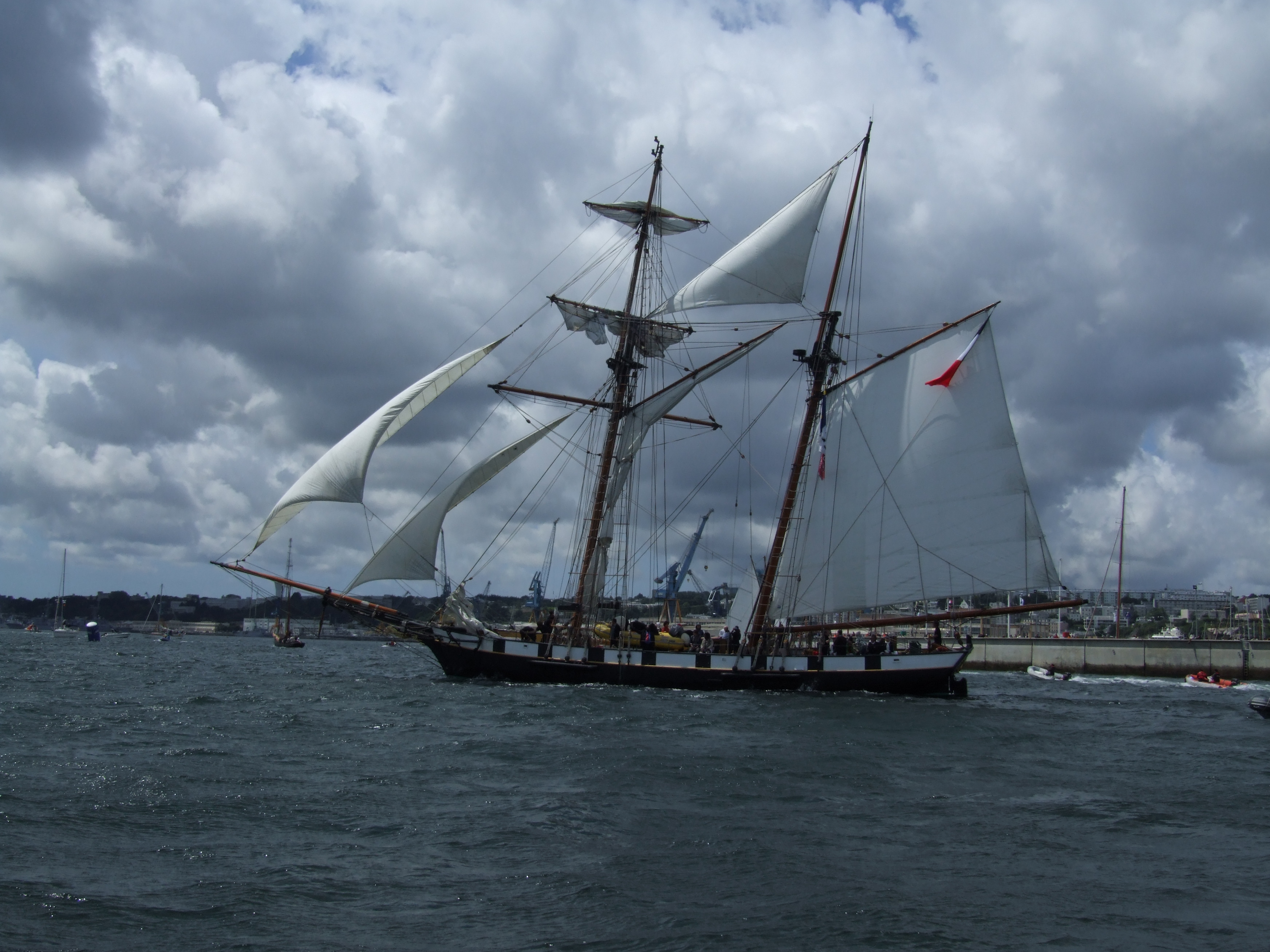 Les Tonnerres de Brest 2012 : La Recouvrance sous voiles en rade abri